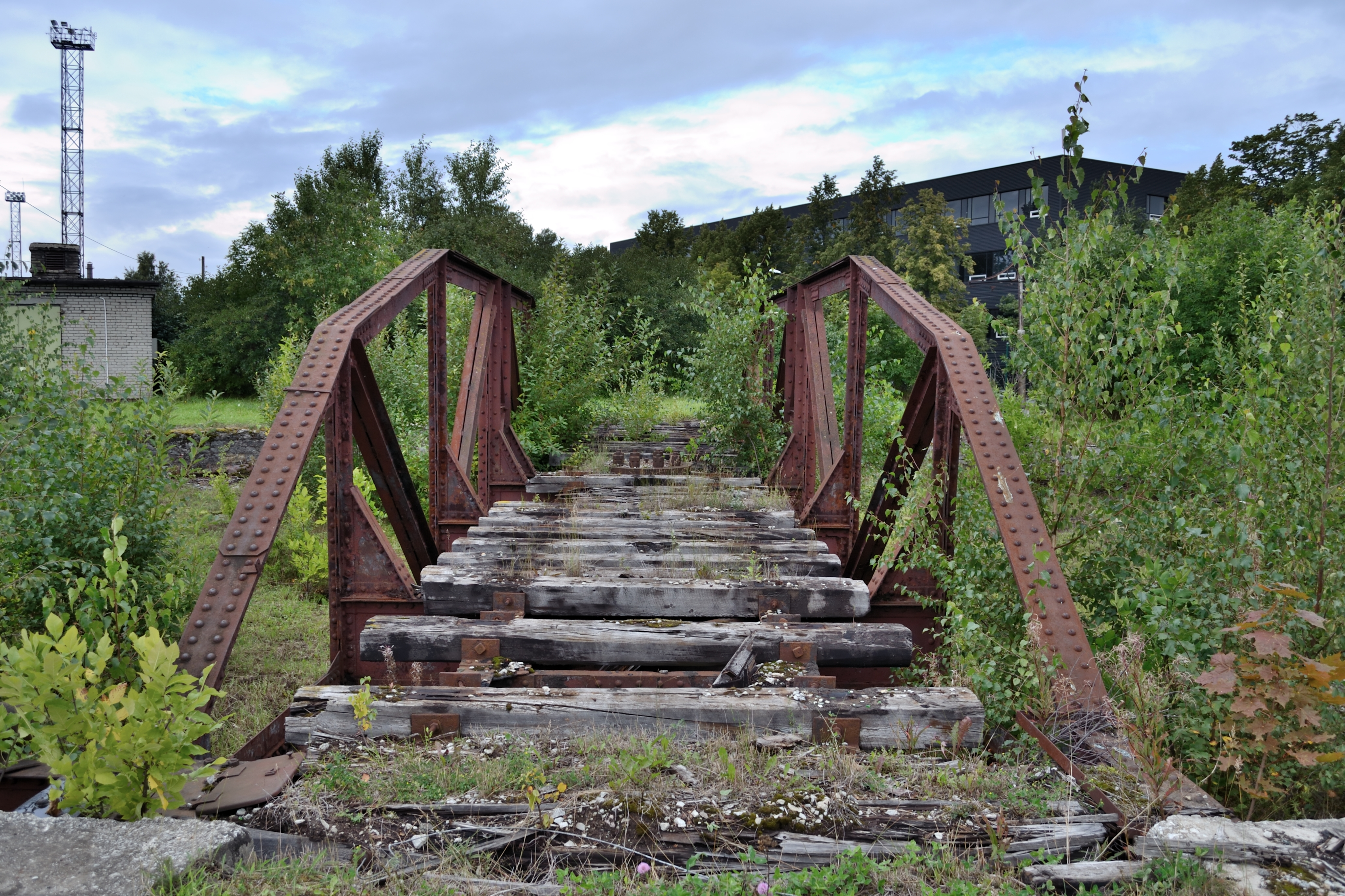 Tallinn, Auruvedurite pöördesild, Kopli 23